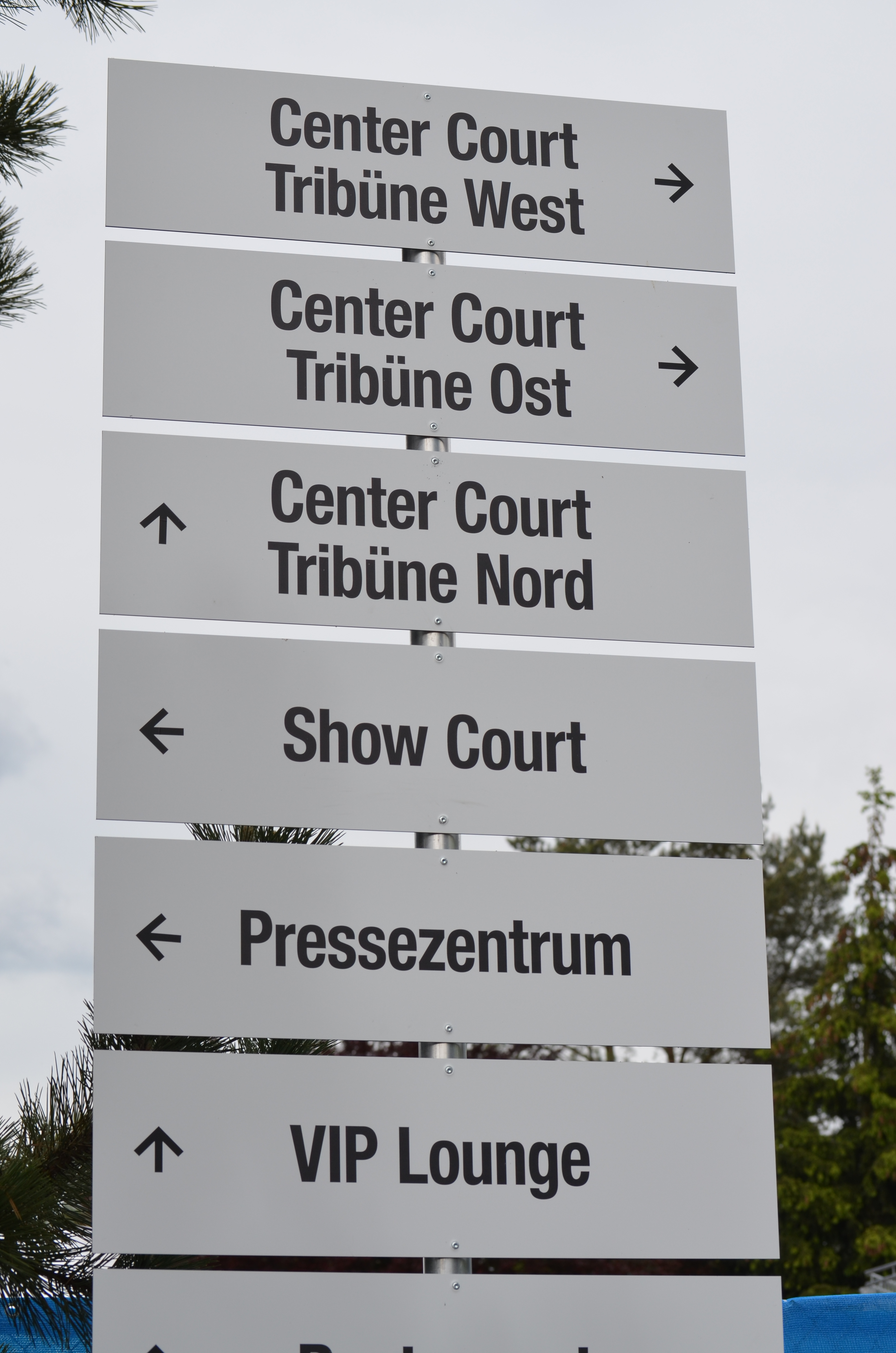 Hinweisschild auf der Anlage des 1.FCN Tennis beim Nürnberger Versicherungscup 2014